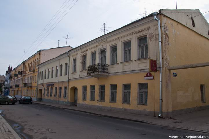 Интернациональная 8